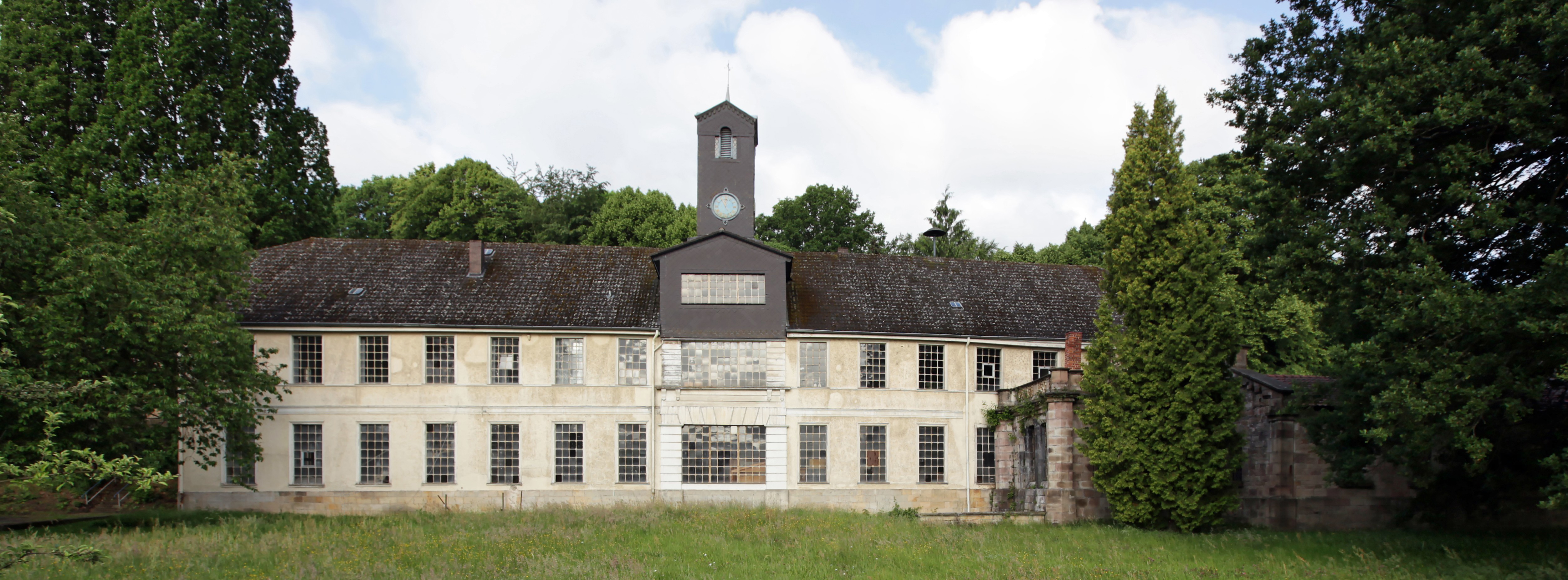 Stillgelegte Eisenhütte in Veckerhagen/Reinhardshagen. (Kasseler Straße 55, Veckerhagen).